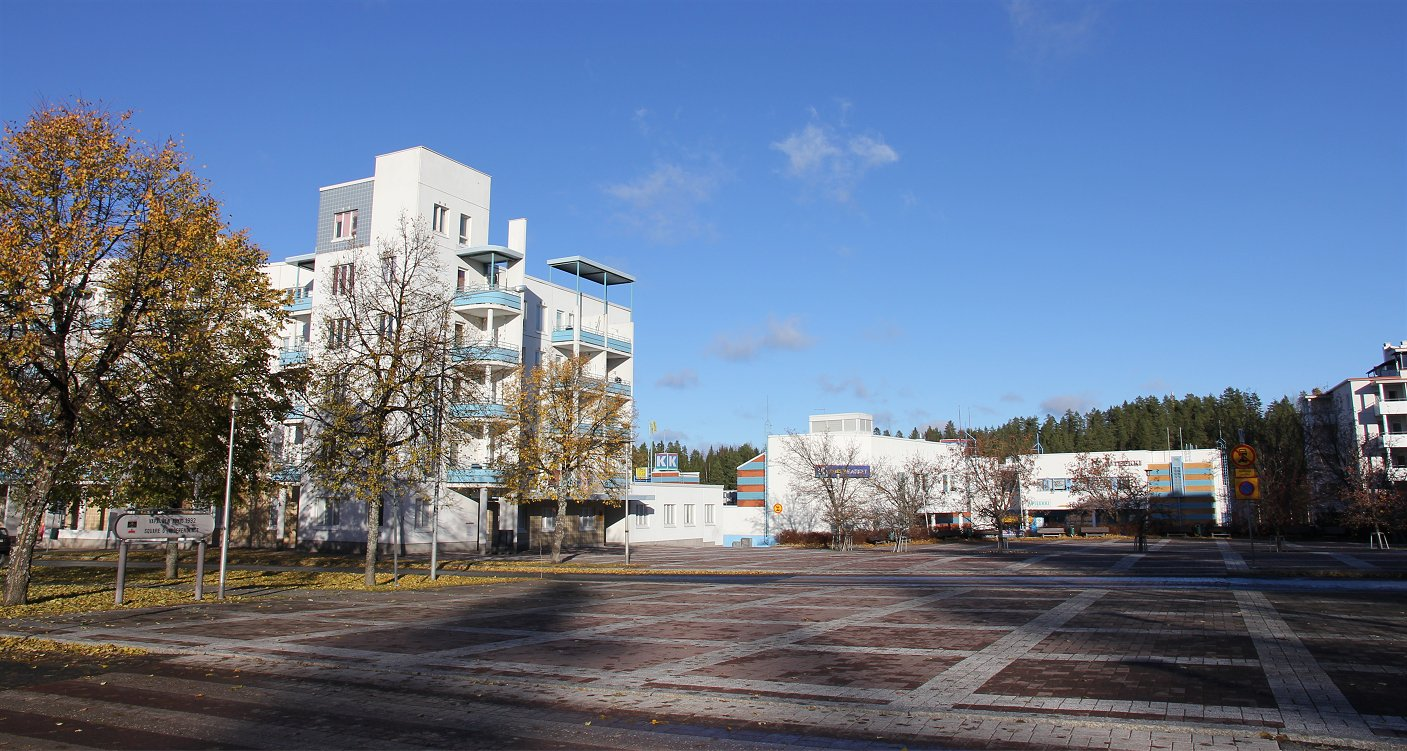 Kuopion Petosen (kaupunginosajaottelun mukaan Litmasen kaupunginosan) keskustaa: vuonna 1982 valmistuneen Vapauden aukion seutua. Taustalla Petosten kauppakeskusta, josta löytyy mm. K-Supermarket, S-market, Kela ja apteekki.